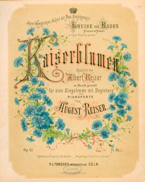 August Reiser: Kaiserblumen. Köln: Verlag P. J. Tonger, um 1880